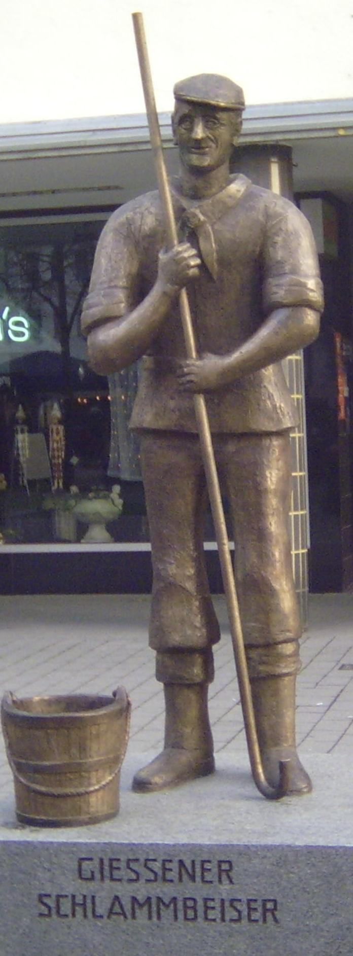 Bild des Gießener Denkmals "Schlammbeiser"